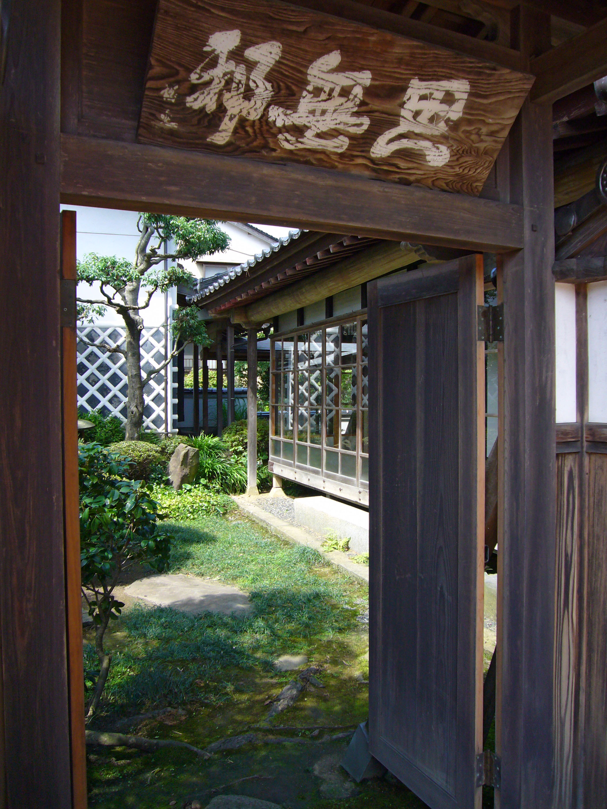 Imeitei in Shinonsen, Hyogo, Japan